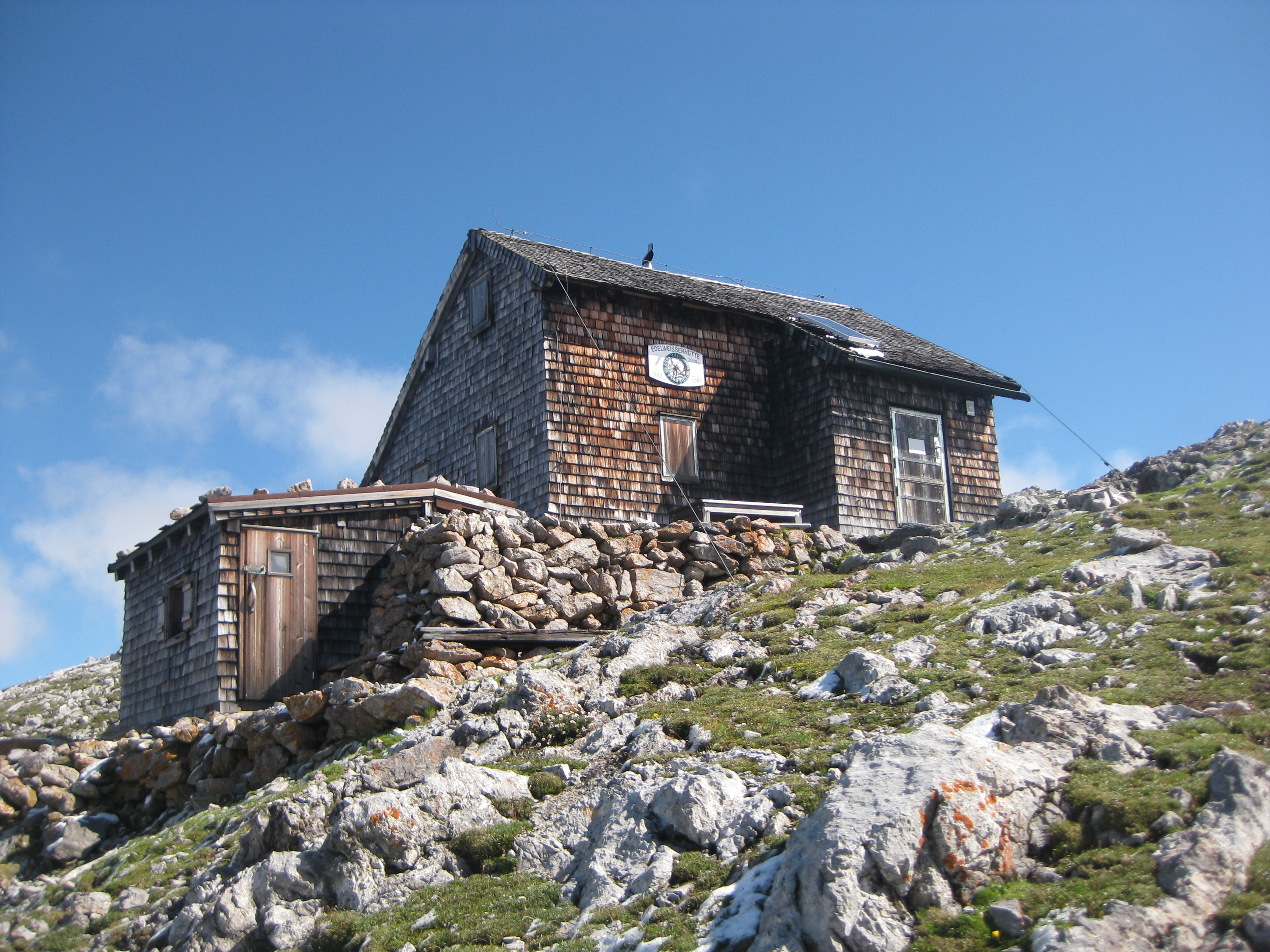 Edelweißerhütte im Tennengebirge